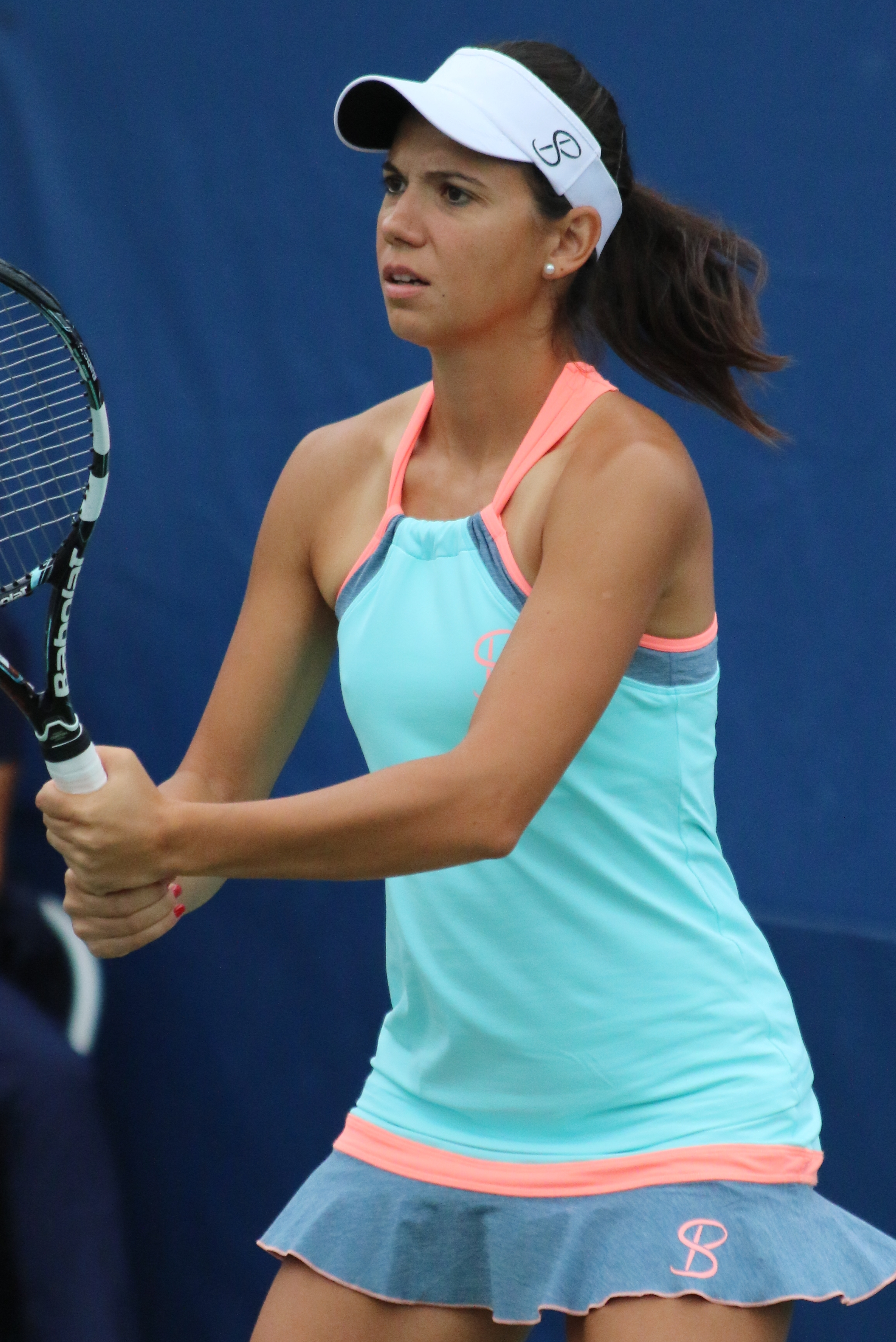 Olaru US16 (26)